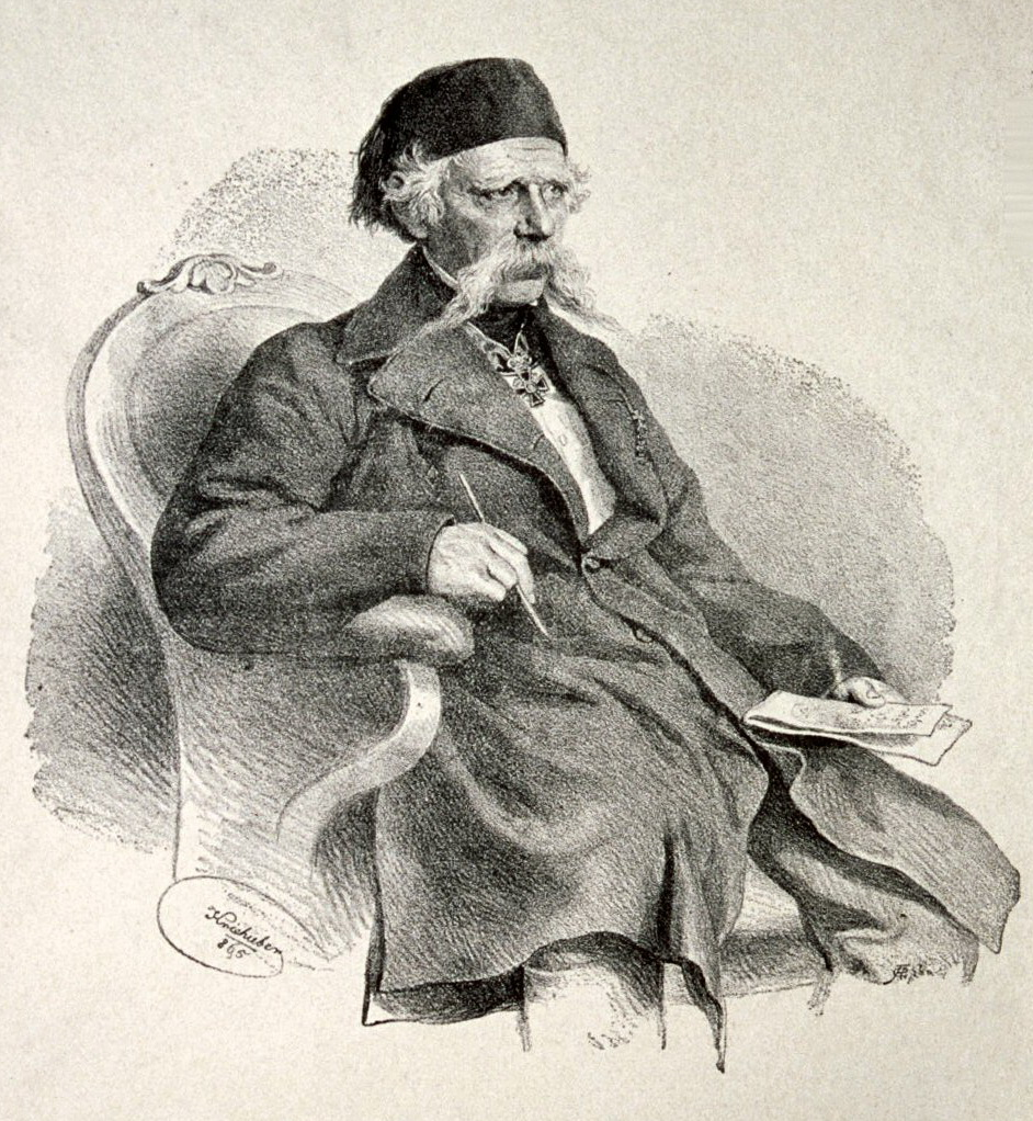 Vuk Karadzic, Lithographie von Joseph Kriehuber, 1865